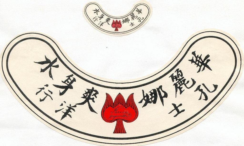 Chinese Farina Label